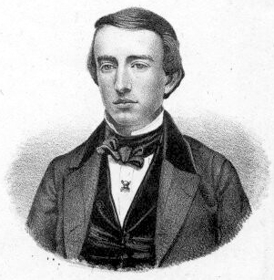 Andrew Dickson White (1832 - 1918), american politician and historian.